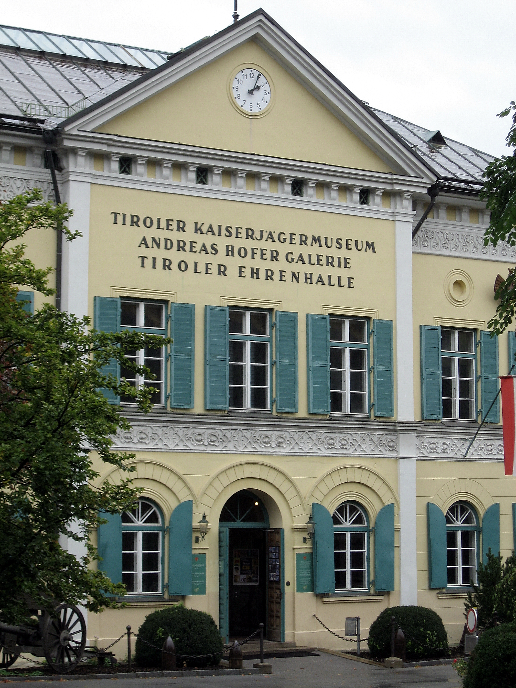 Österreich, Innsbruck, Bergisel, Tiroler Kaiserjägermuseum